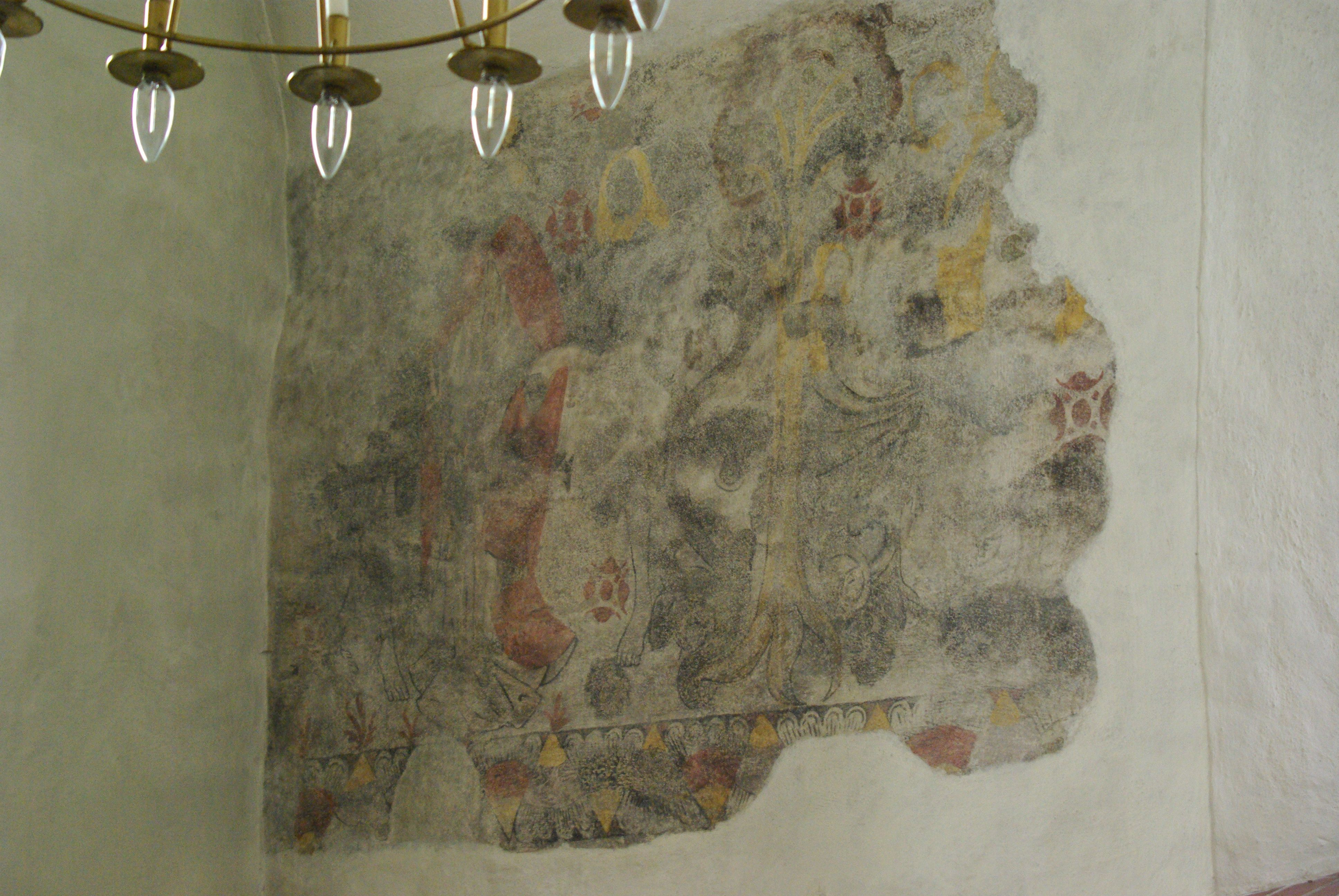 Växjo, Schweden, im Dom, das Bild ist aus dem 15. Jahrhundert und stellt Adam und Evas Leben, den Sündenfall und die Vertreibung aus dem Paradies dar.